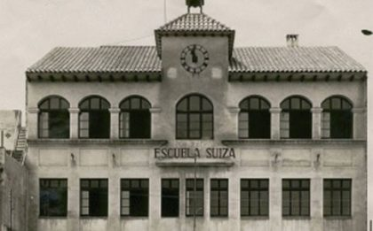 Escuela Suiza de Barcelona, años 20 del siglo XX